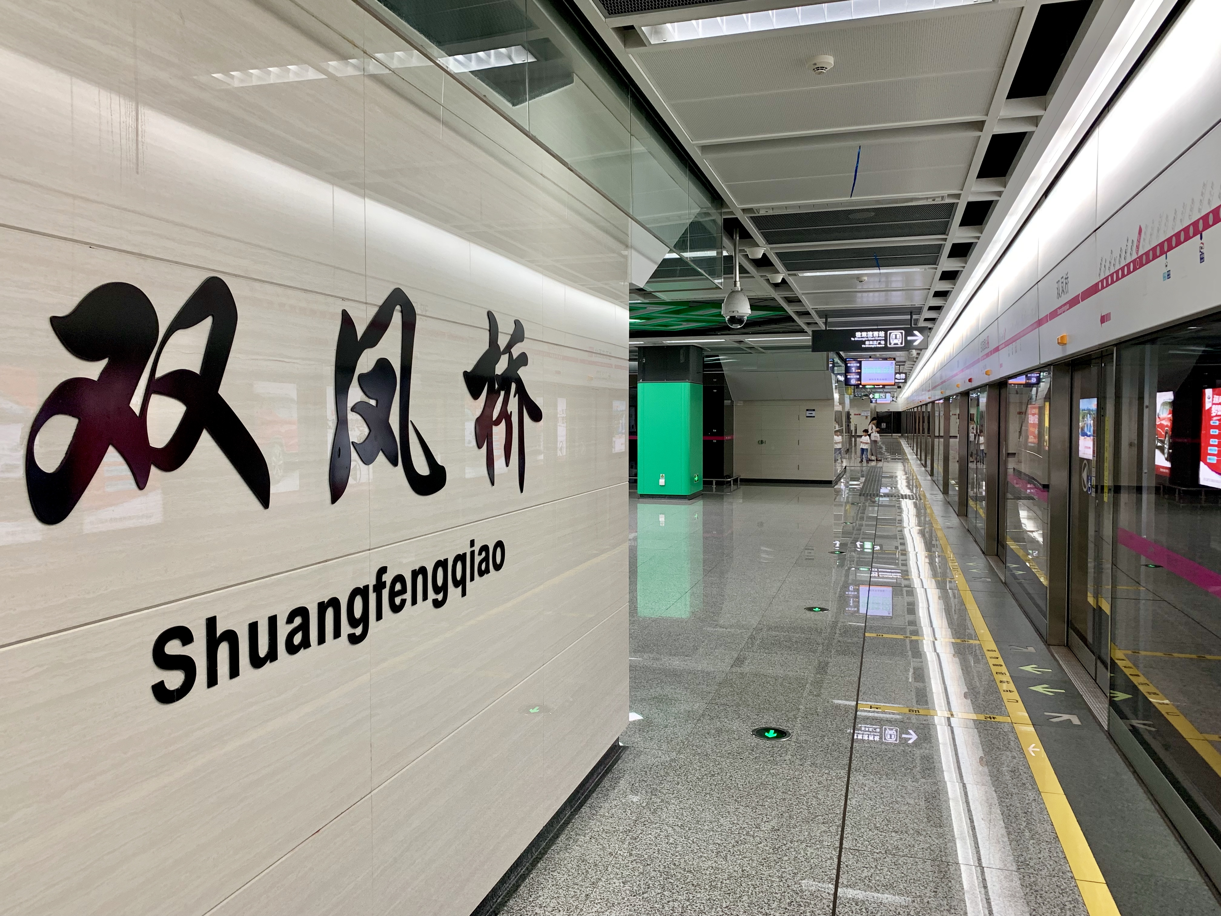 成都地铁双凤桥站